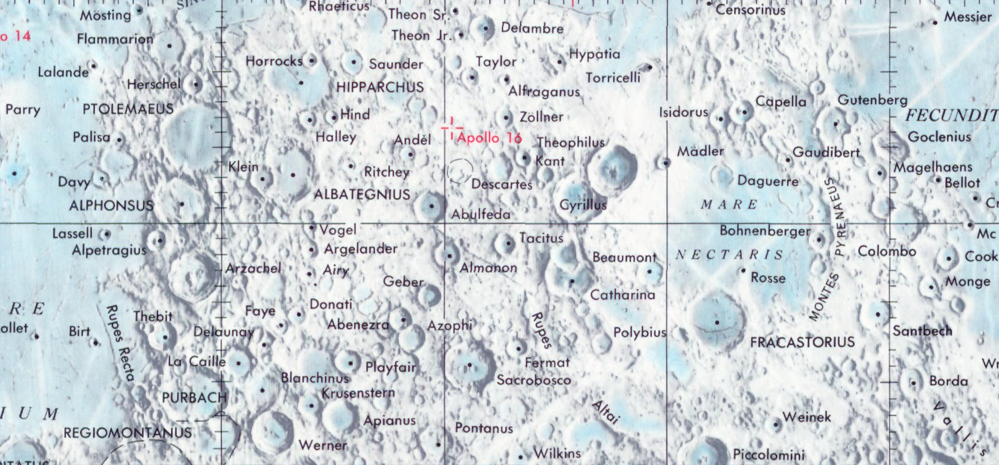 Cráter lunar Tacitus. Localización. (Lunar Chart LPC1. Second Edition)